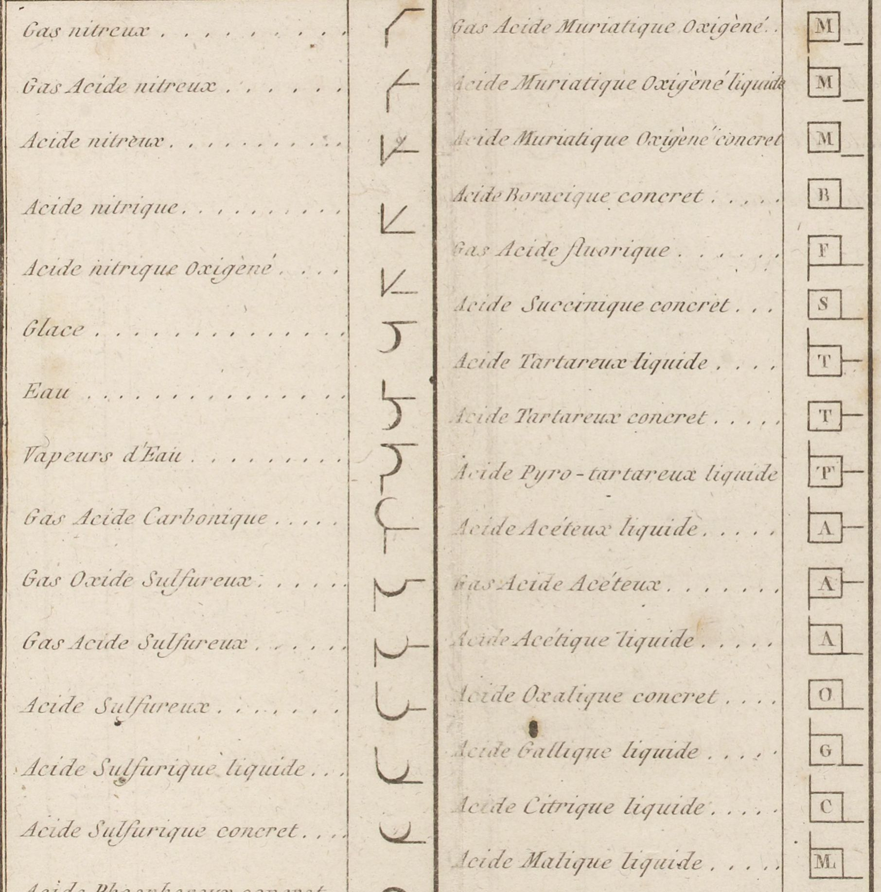 Part de la Taula III del llibre Méthode de Nomenclature Chimique, que duu per títol "des Combinasions connues de l'Oxigen et du Calorique avec Differents Corps"